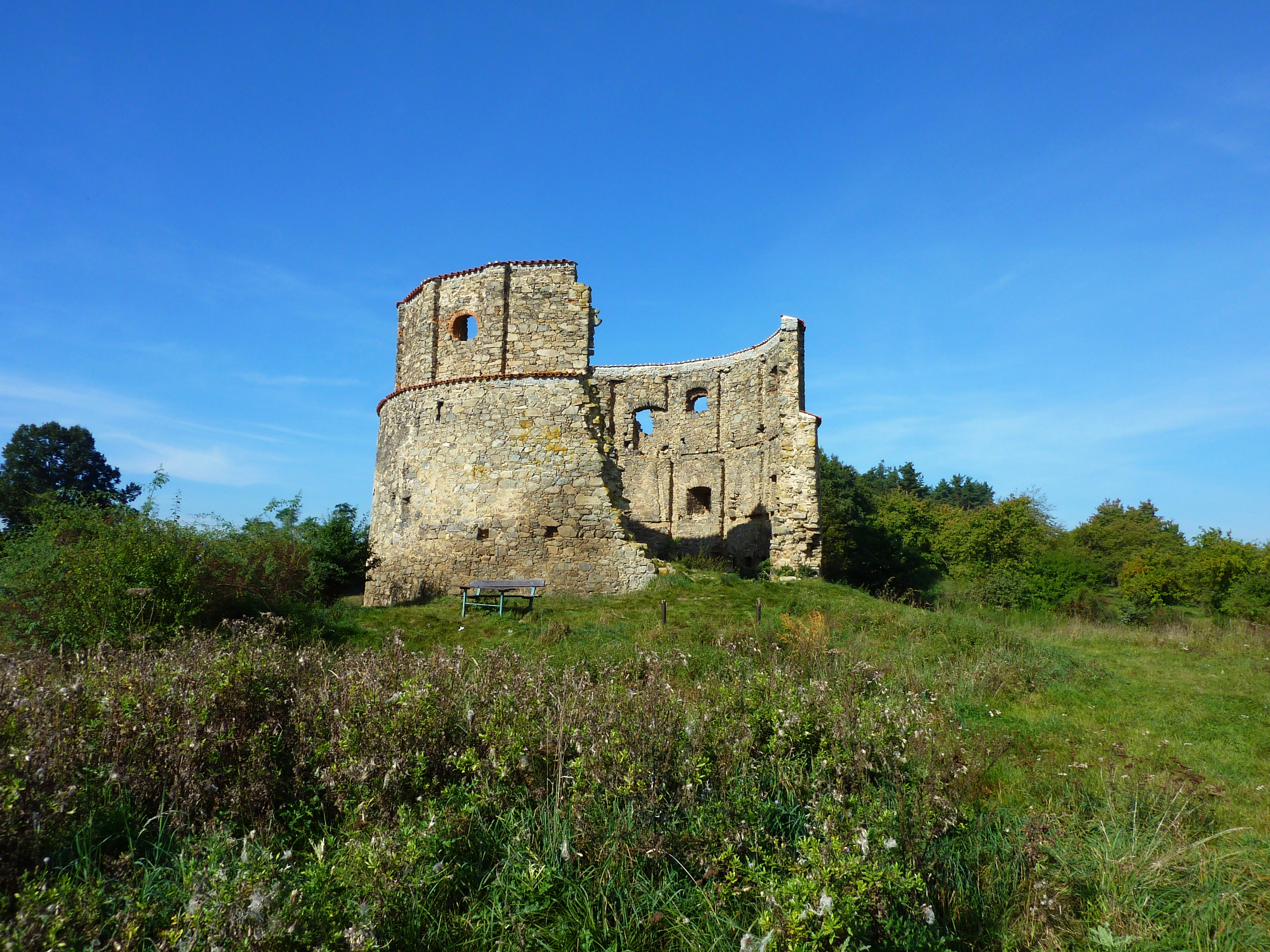 Zřícenina větrného Mlýnu v Příčovech ..